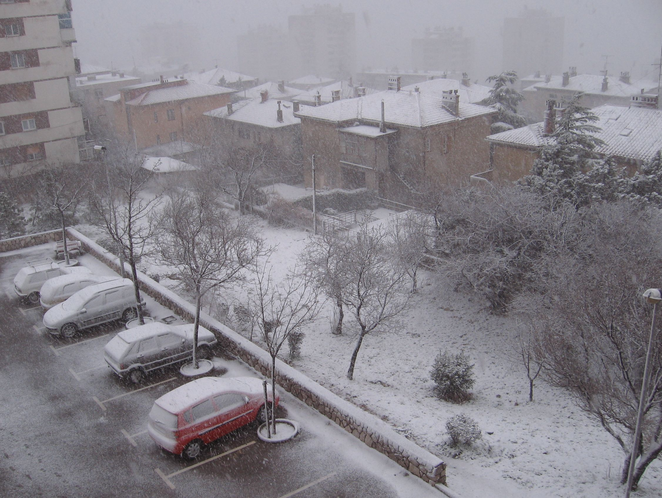 Rijeka, snijeg.